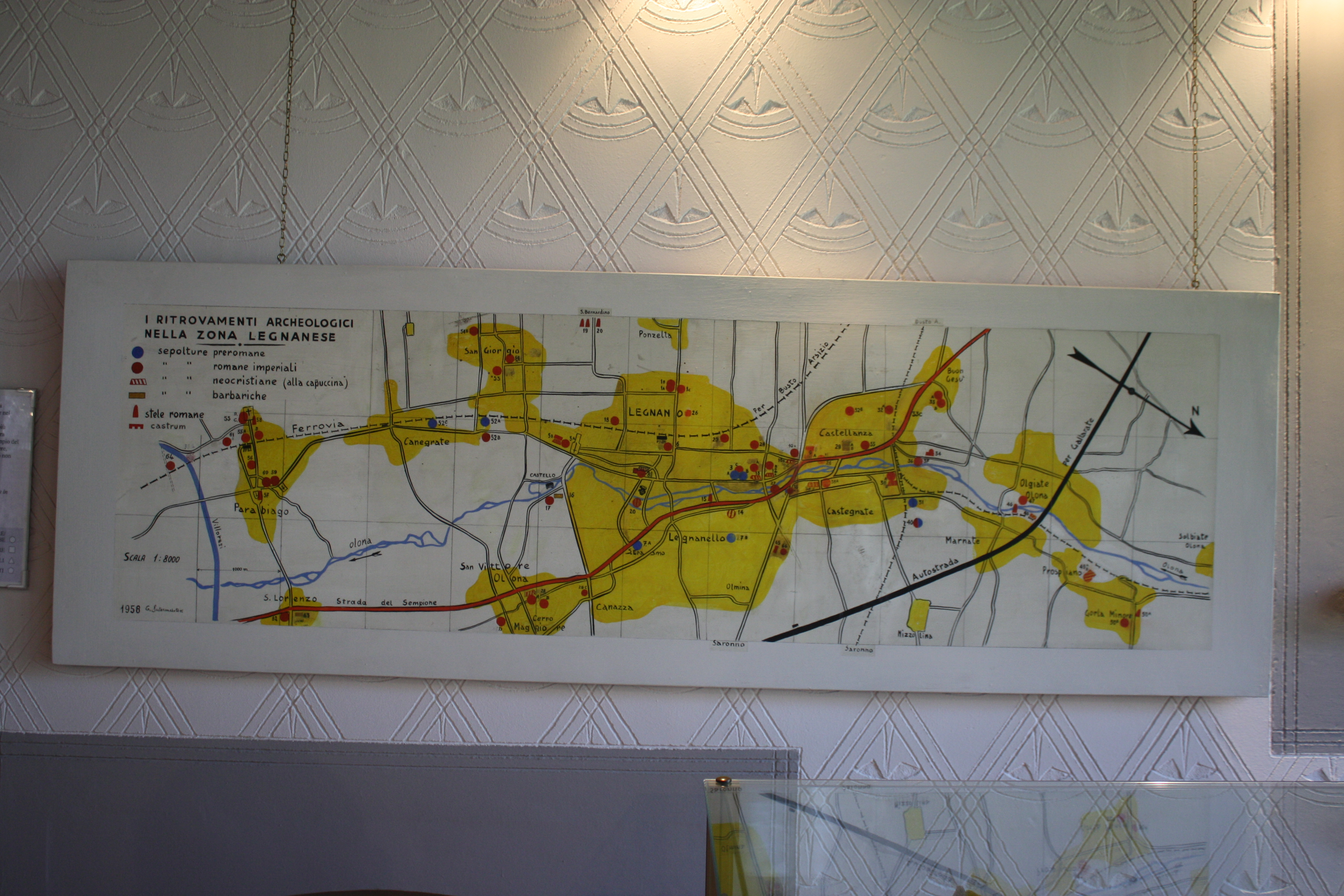 Mappa di Guido Sutermeister che indica i ritrovamenti archeologici scoperti nell'Alto Milanese.